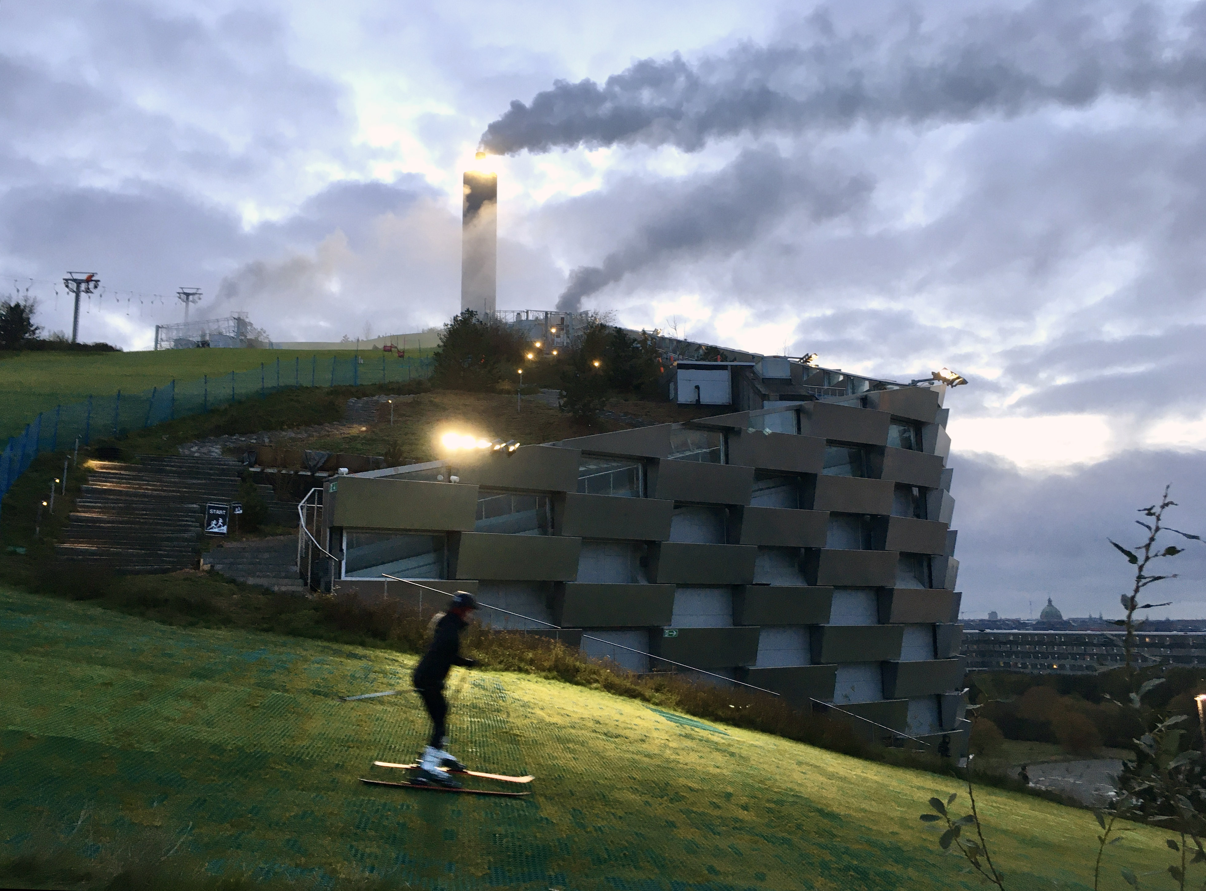 Skiing in Amager Bakke, Copenhagen